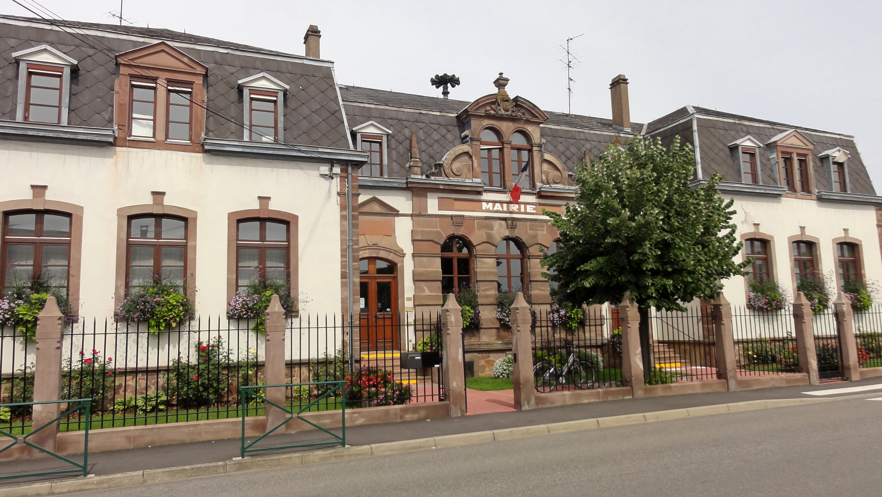 Alsace, Bas-Rhin, Hindisheim, Mairie-école (XIXe), 130 rue de la Gare.